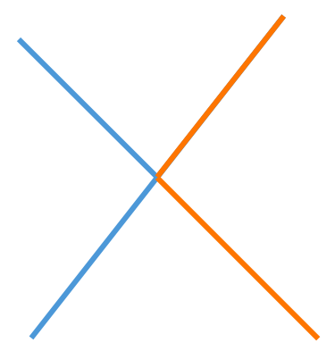 Gesetz der guten Fortsetzung